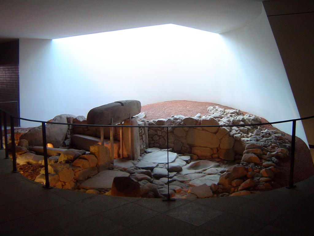 Termas pré-Romanas de Braga. Situadas em Maximinos (estação da CP).